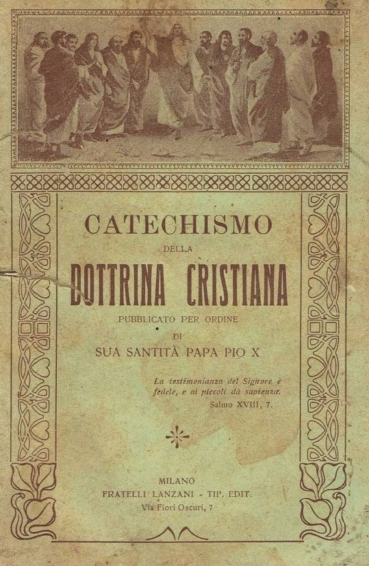 Pio X, Catechismo della Dottrina Cristiana, Fratelli Lanzani Tipografi Editor, 1913